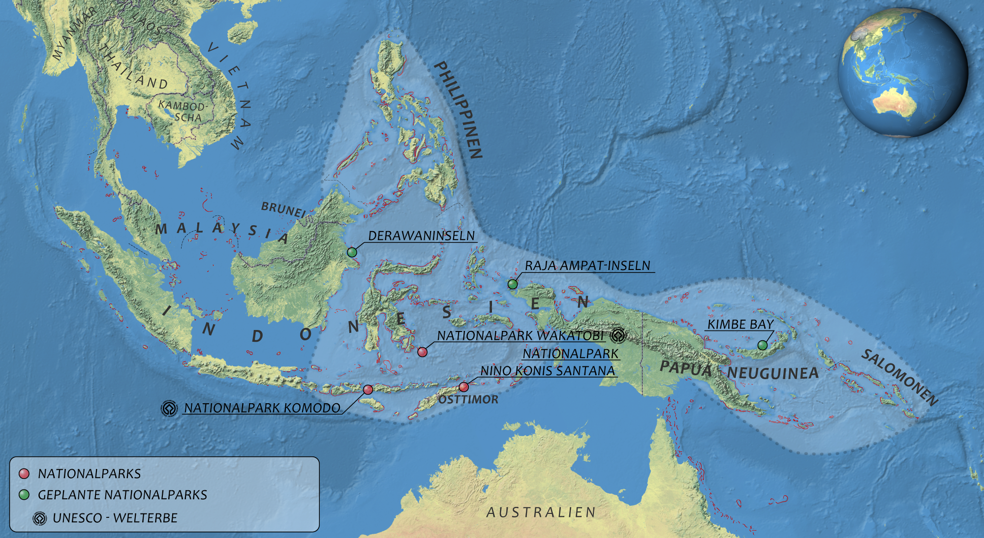 Lagekarte des Korallendreiecks